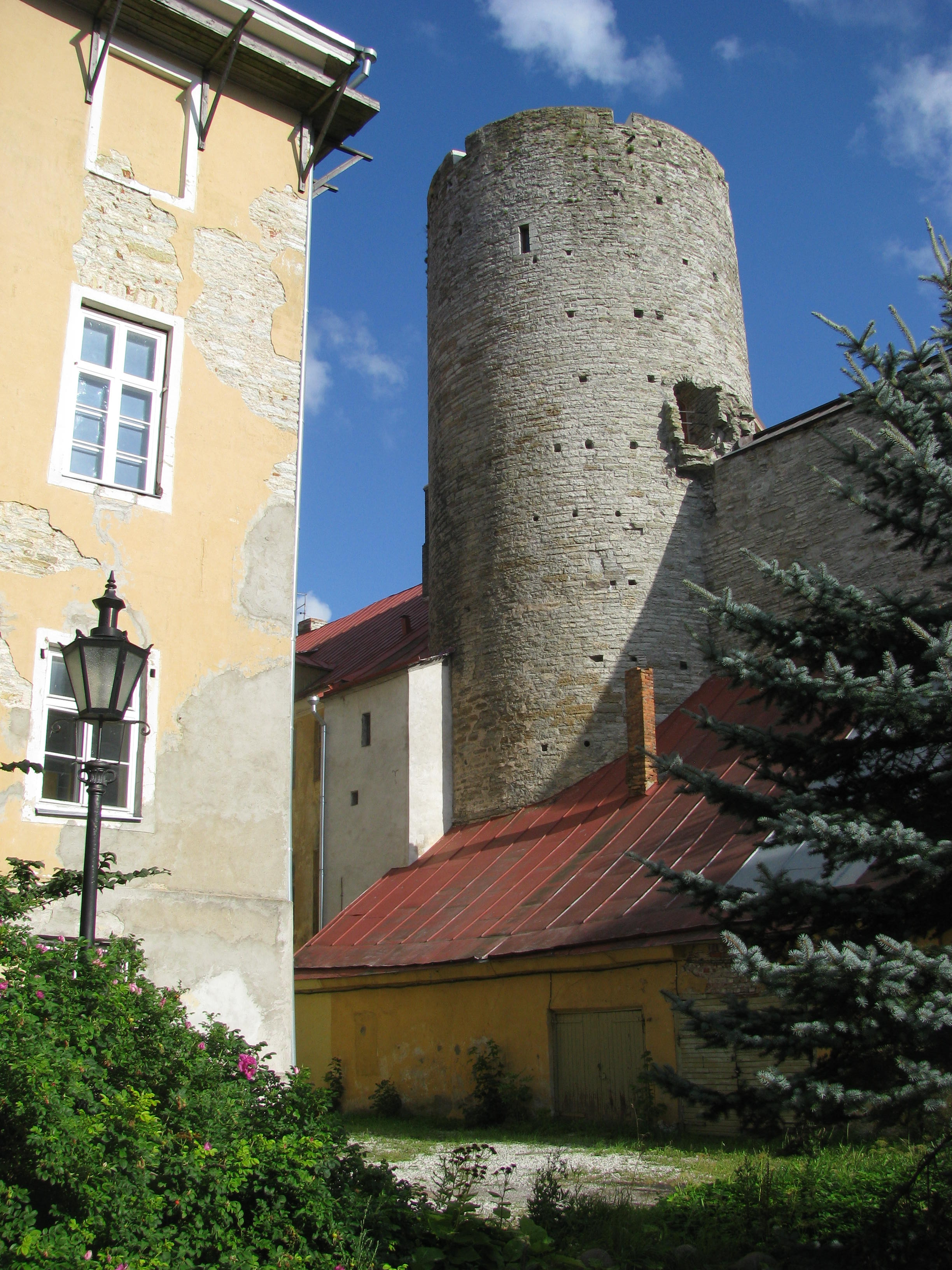 Landskrone torn Toompea lossi kirdenurgas jääb tänapäeval majade varju.